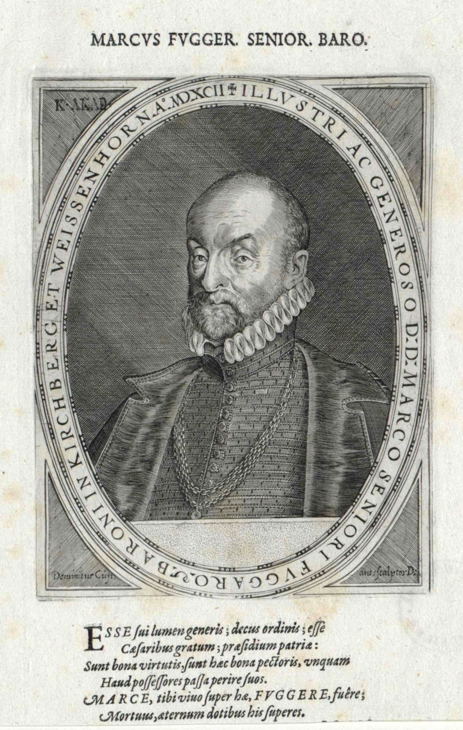 Markus Fugger d.Ä., Freiherr von Kirchberg und Weißenhorn (1529–1597)